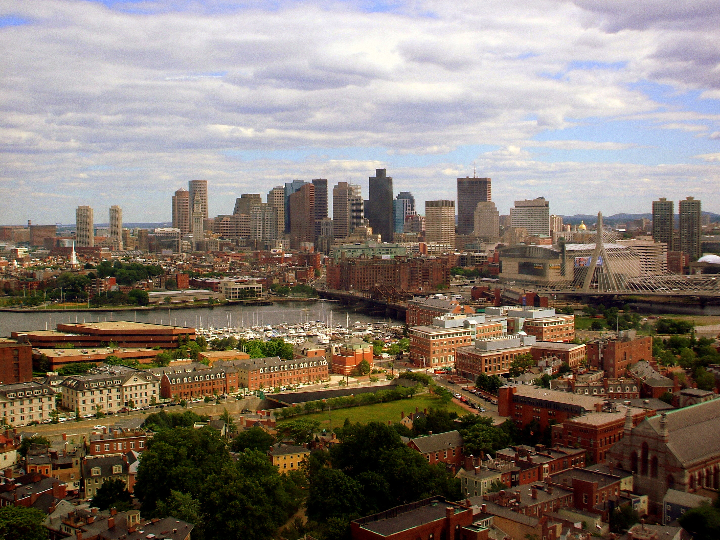 Boston Skyline